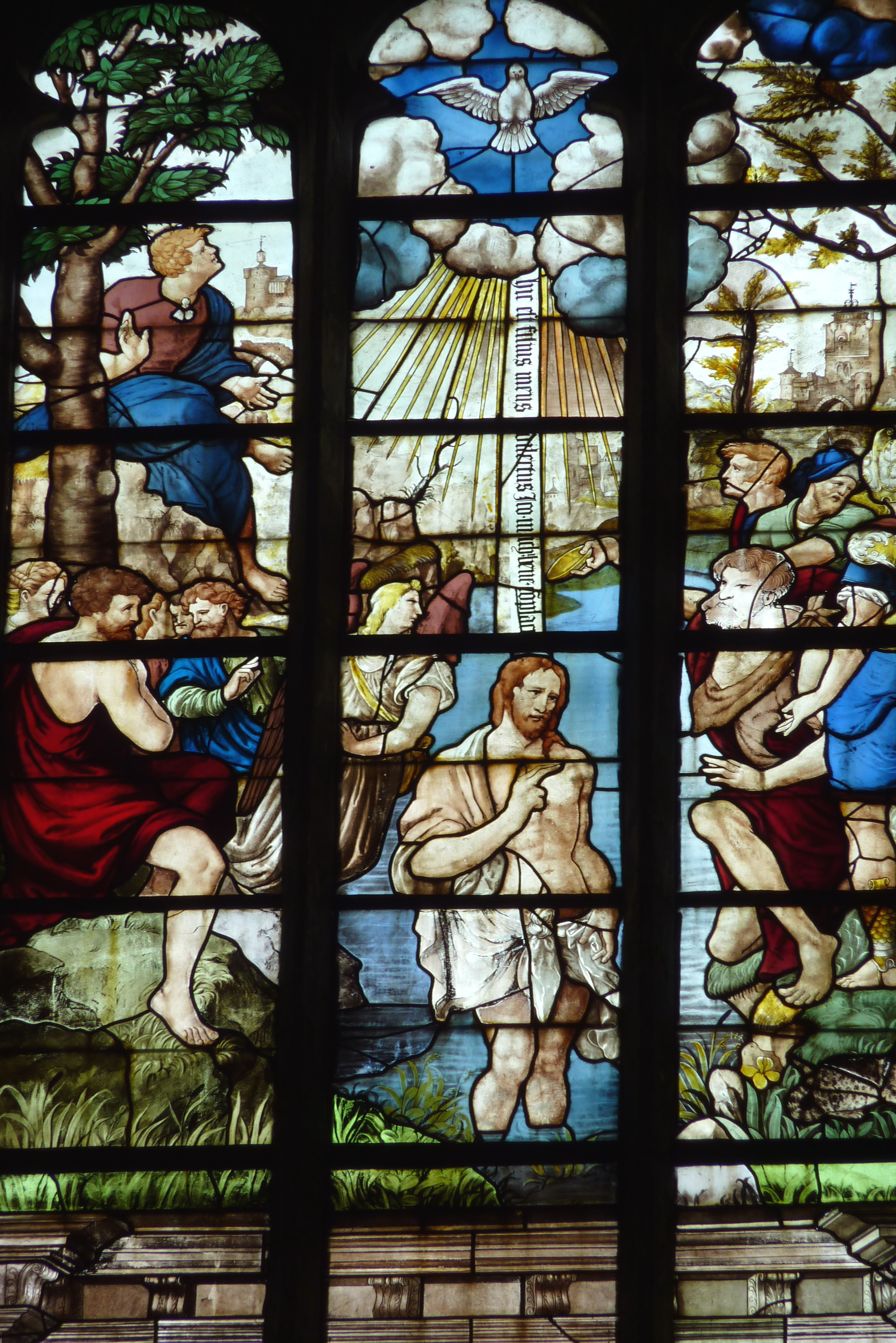 Katholische Pfarrkirche Saint-Jean-Baptiste in Nemours im Département Seine-et-Marne in der Region Île-de-France (Frankreich), Bleiglasfenster im Chor um 1550; von Laurent Marchant, Darstellung: Taufe Jesu durch Johannes den Täufer (Ausschnitt)